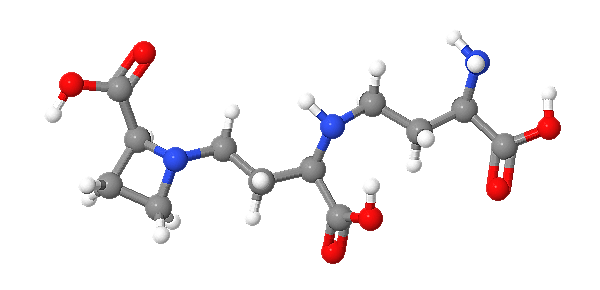 Estructura 3D del aminoácido no proteico nicotianamina